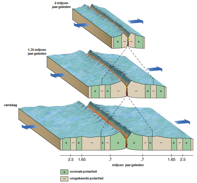 Paleomagnetisme